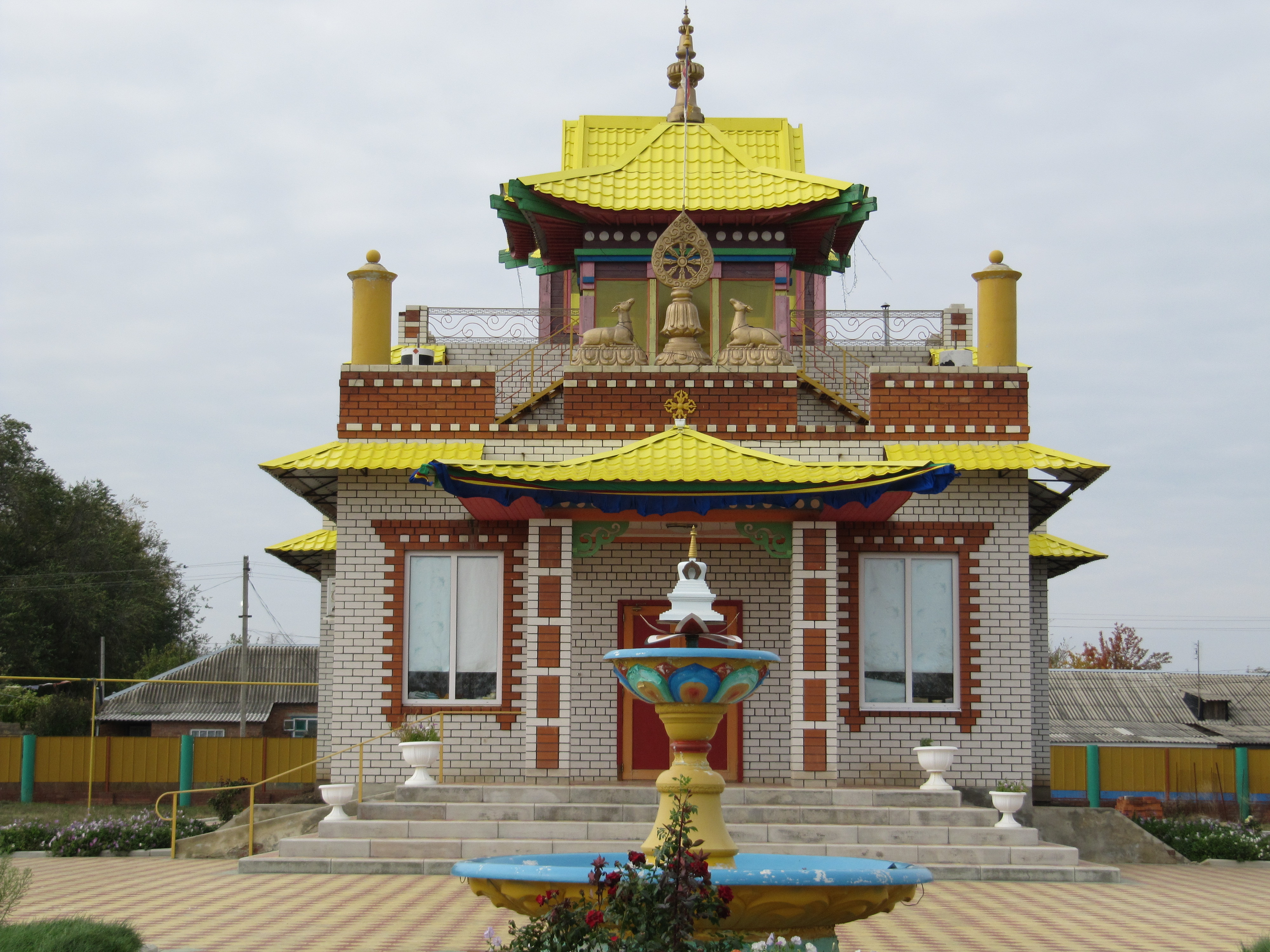 Тантрический монастырь Владыки Зонкавы, Городовиковск, Калмыкия